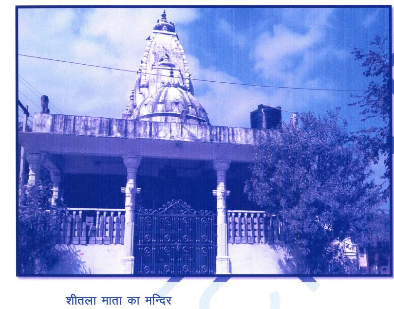 टॉडगढ